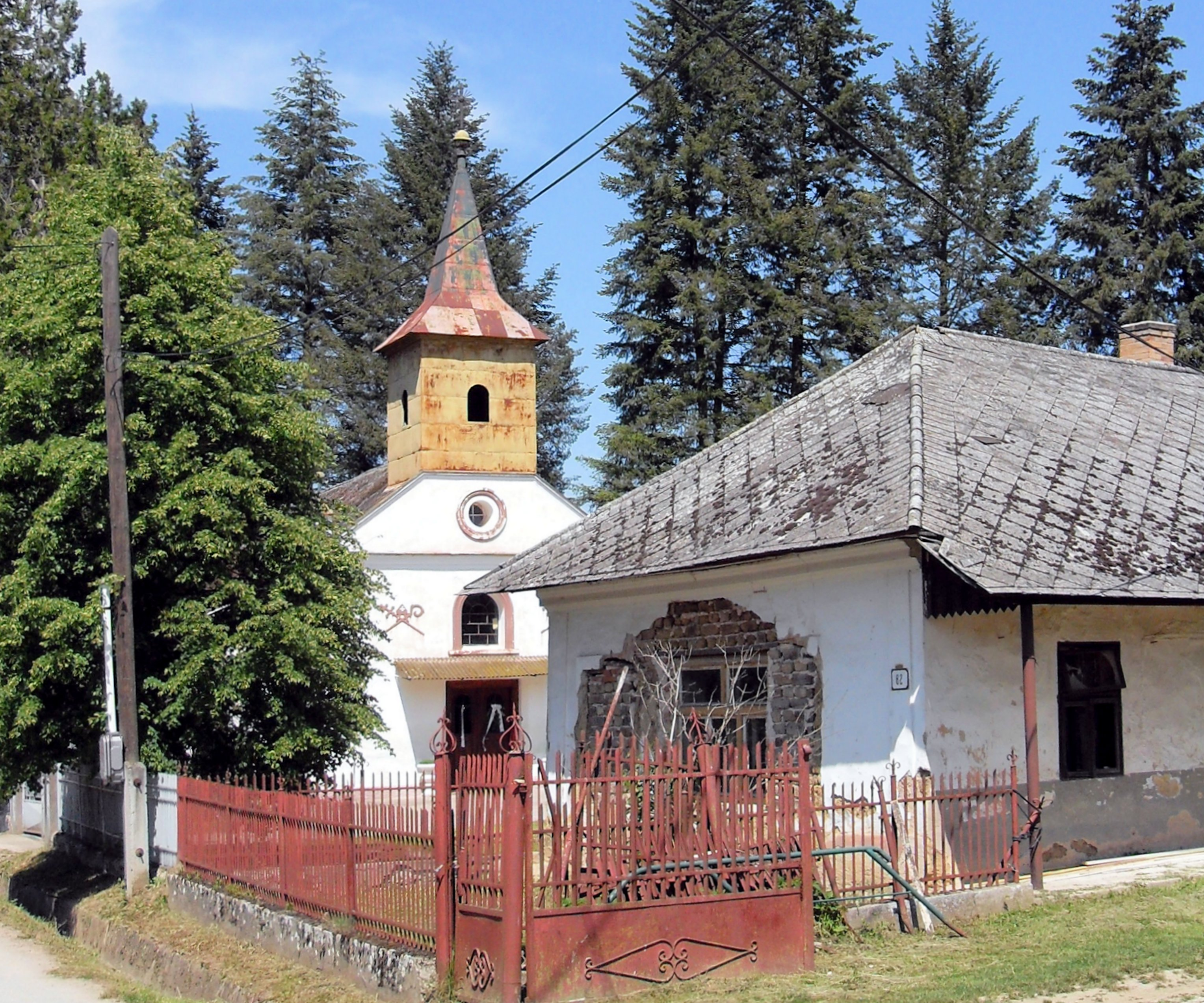 Rešica, staré Rímskokatolícky Kostol Panny Márie Ružencovej